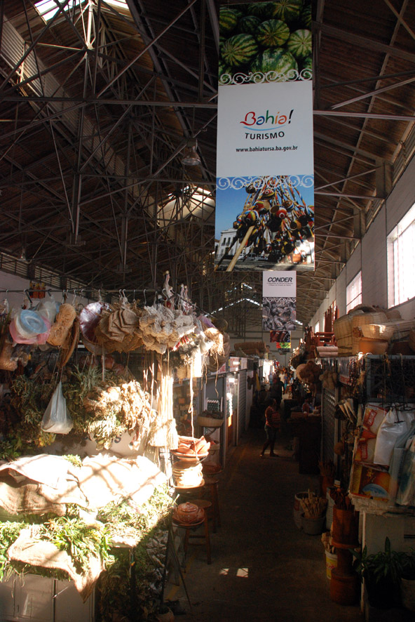 Visita às Obras da Feira de São Joaquim, em 23.04.2012 - Foto: João Ramos - Bahiatursa